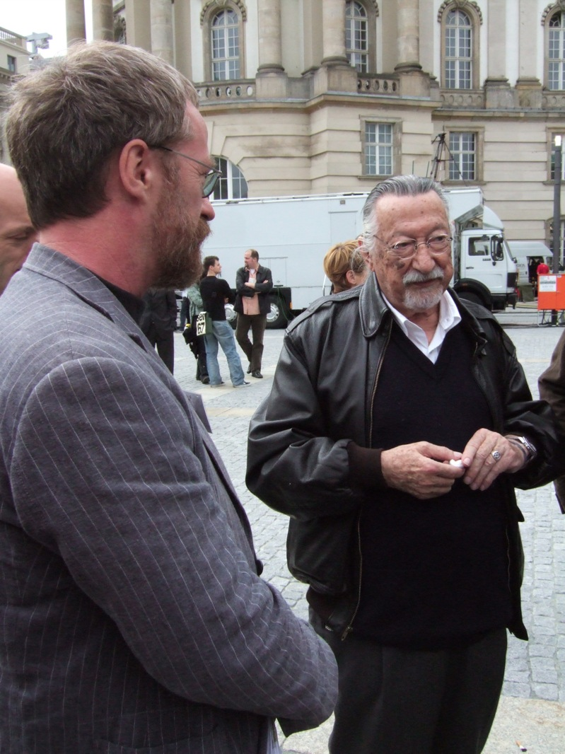 Prof. Hans Uszkoreit and Prof. Joseph Weizenbaum